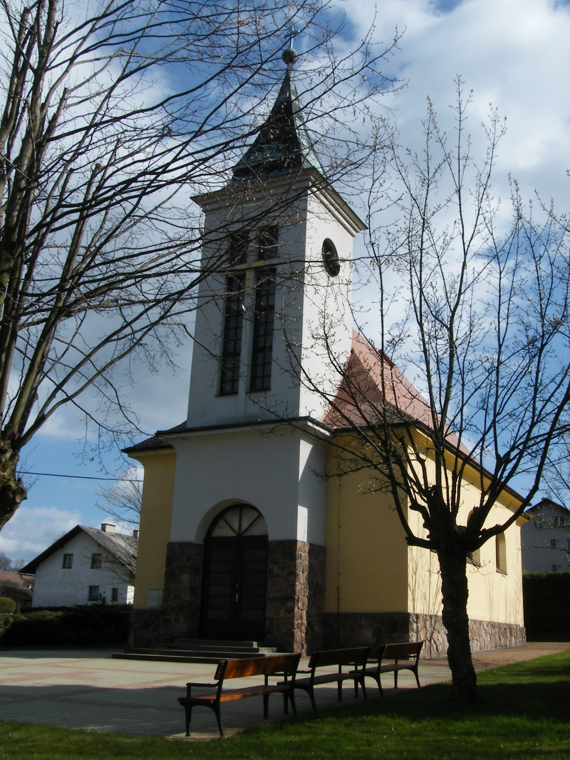 Kaple sv. Václava (Česká Čermná)